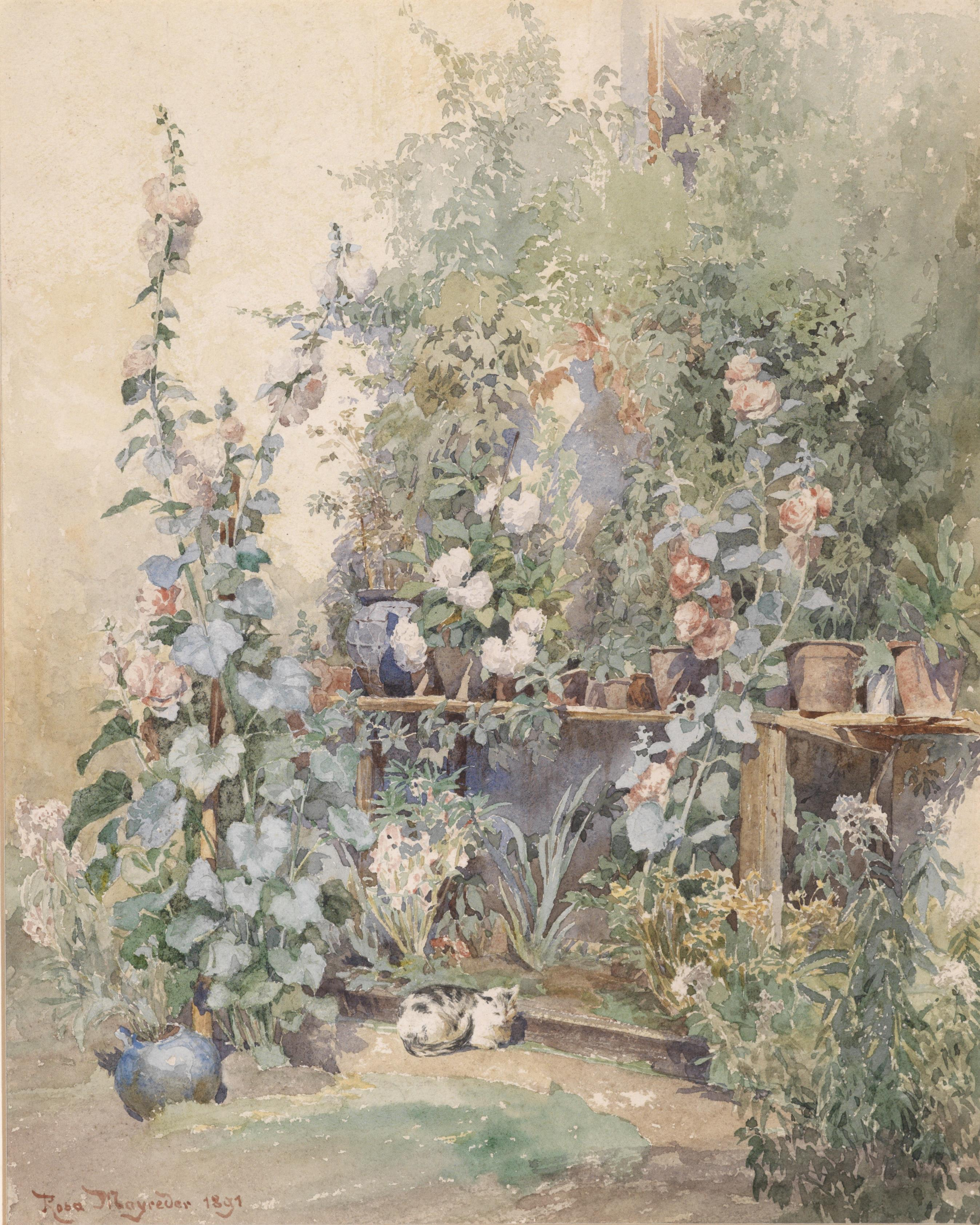 Gartenstillben mit Kätzchen